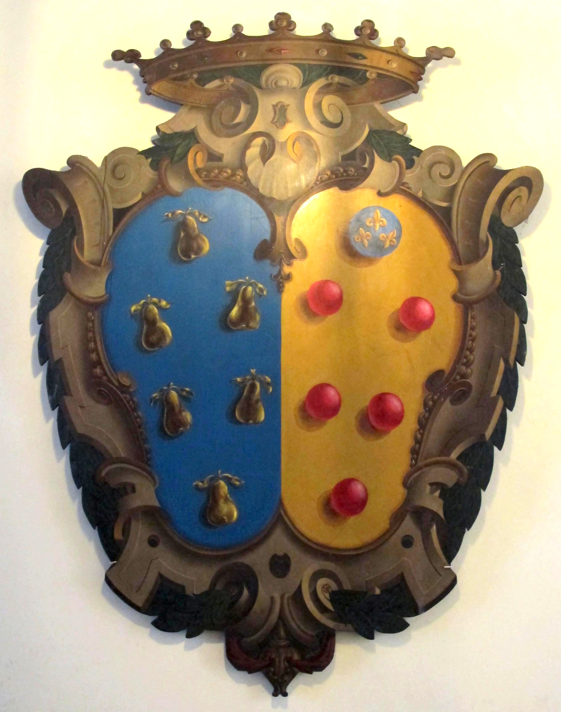 Palazzo di ubaldino peruzzi, fi, stemma peruzzi-medici